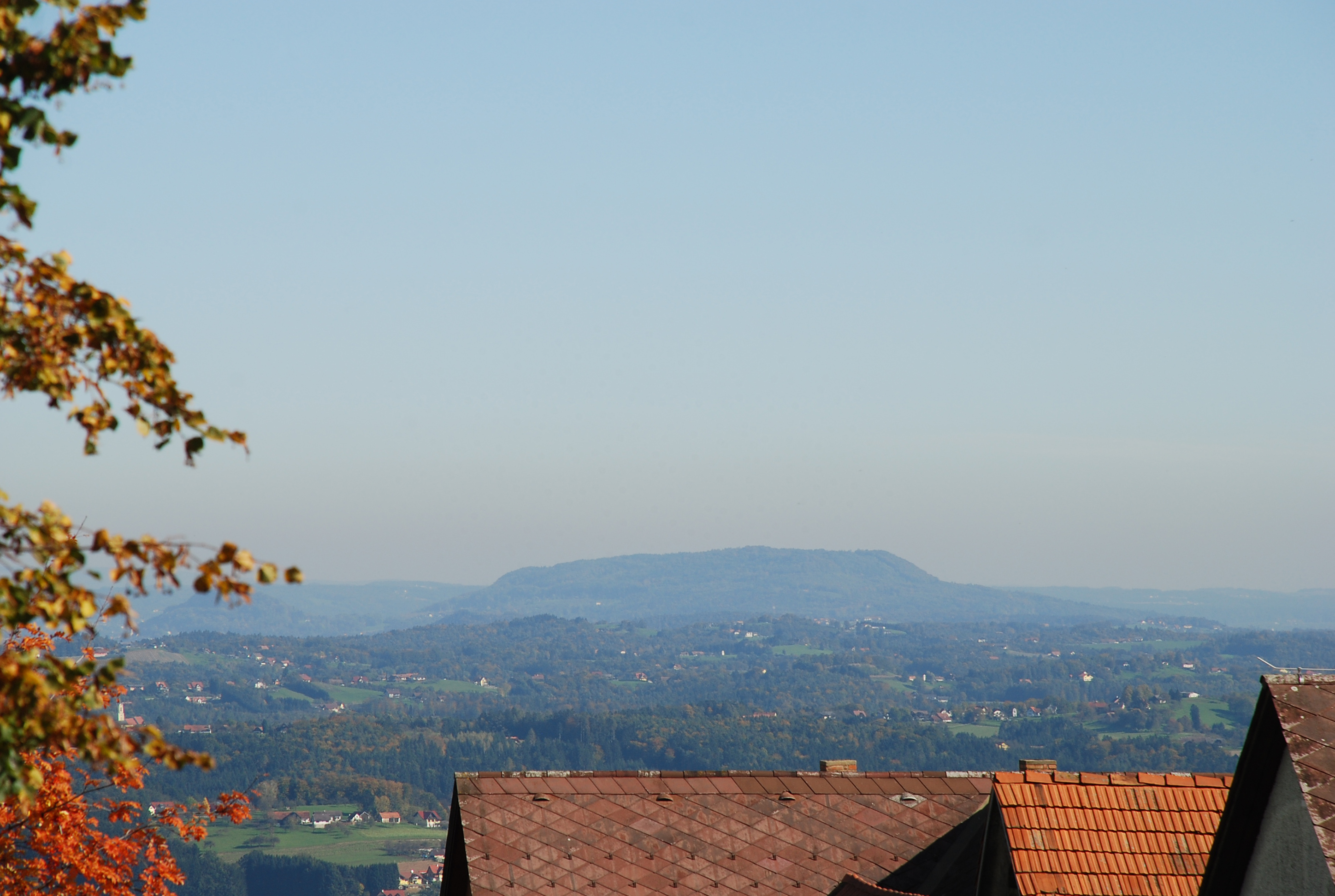 Steiermark, Österreich: Wildoner Kogel (Buchkogel) von Greisdorf aus